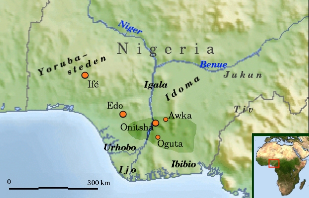 Kaart historisch Nri and Igboland met Nederlands opschrift